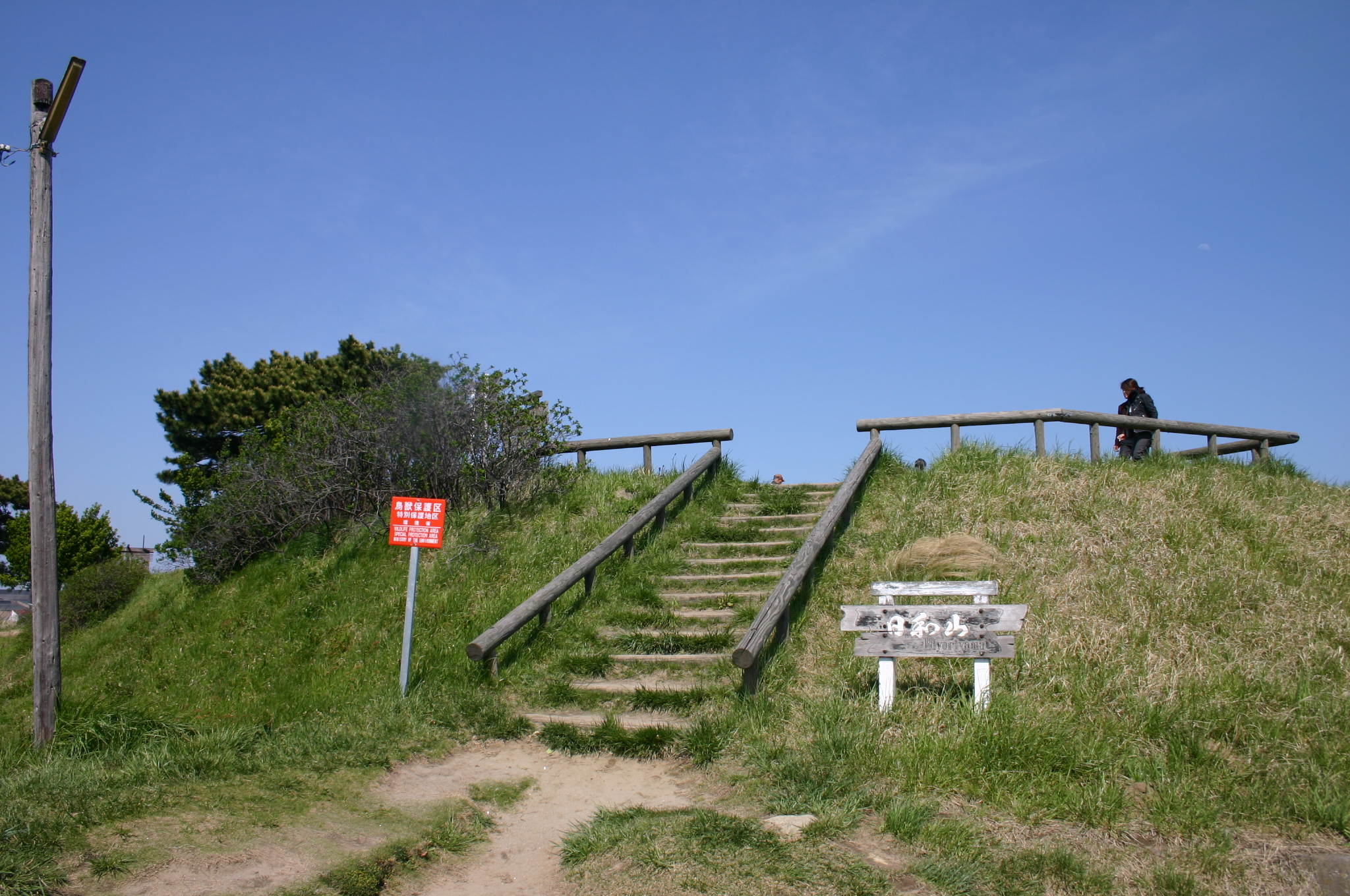 被災前の日和山近景